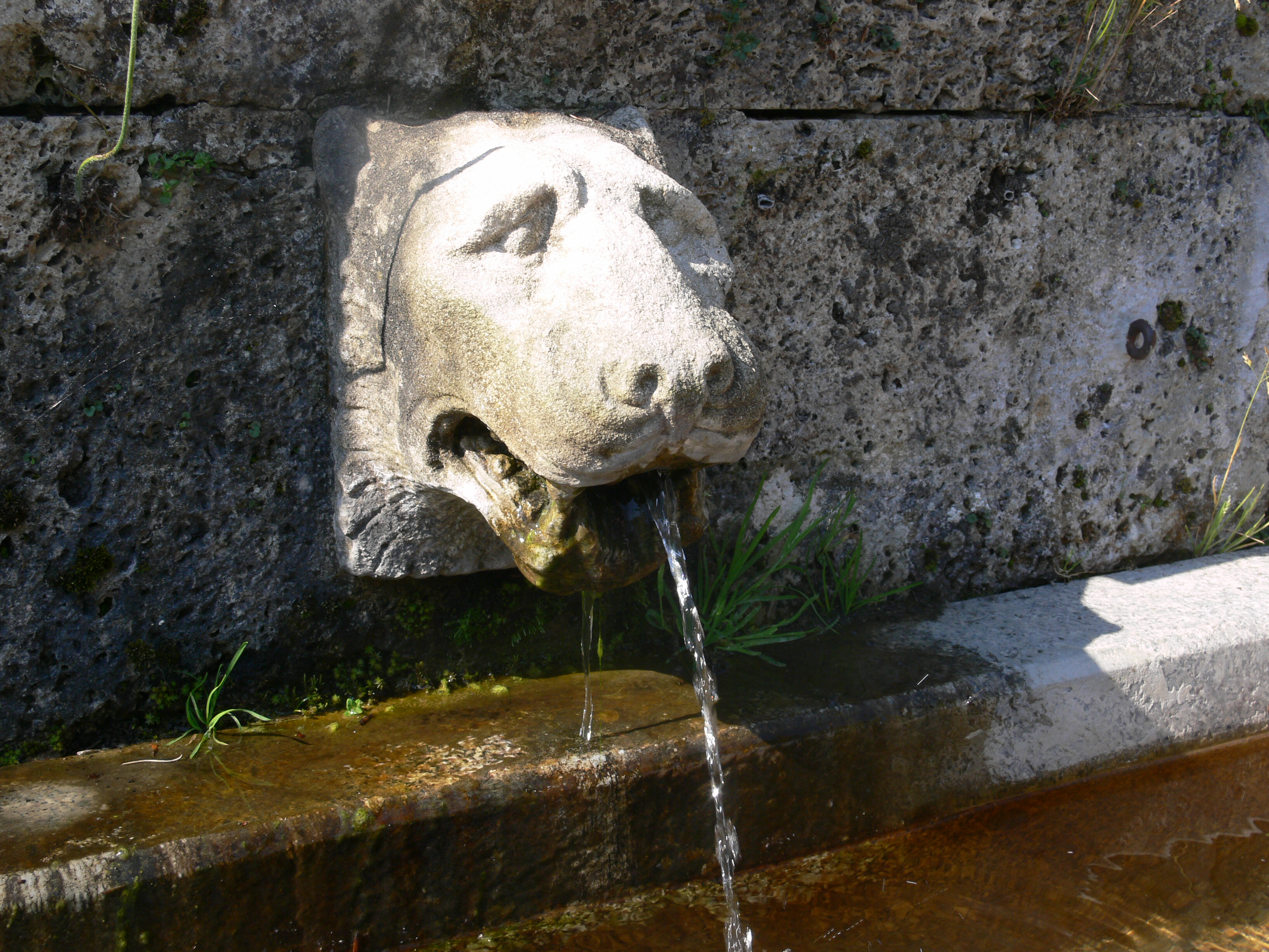 St.-Maurus-Kapelle, Beuron (Donautal), erbaut 1868–1870, Architekt: Desiderius Lenz, Maler: Gabriel Wüger Brunnen, Löwenkopf